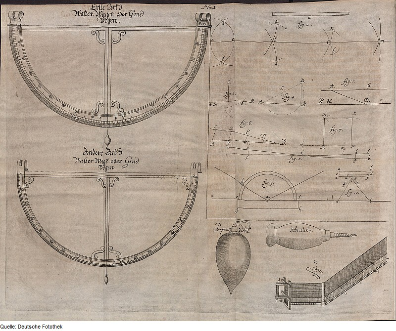 Original image description from the Deutsche Fotothek Bergbau & Markscheidekunst & Messinstrument & Gradbogen